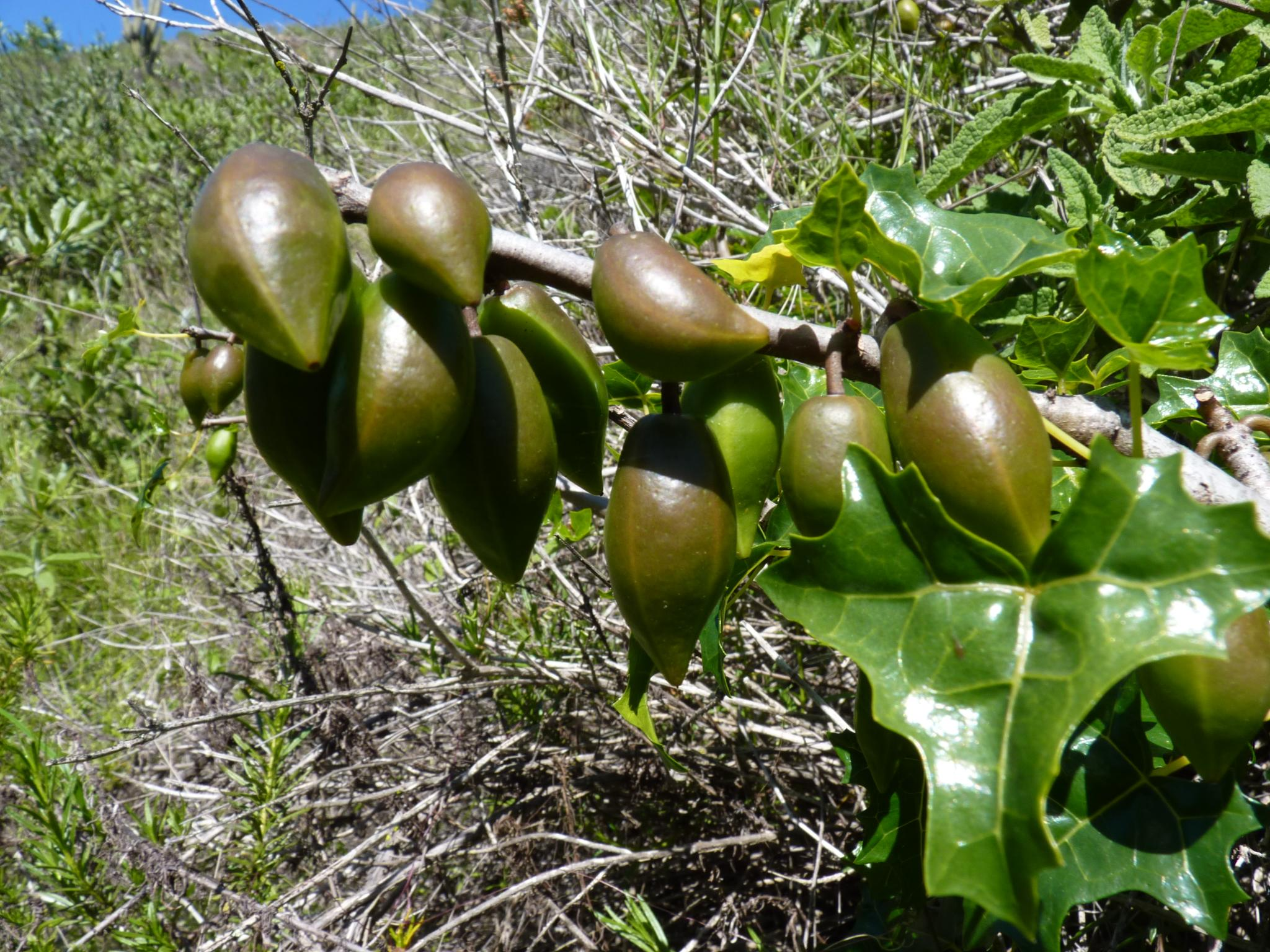 Carica chilensis, Pupio Los Vilos